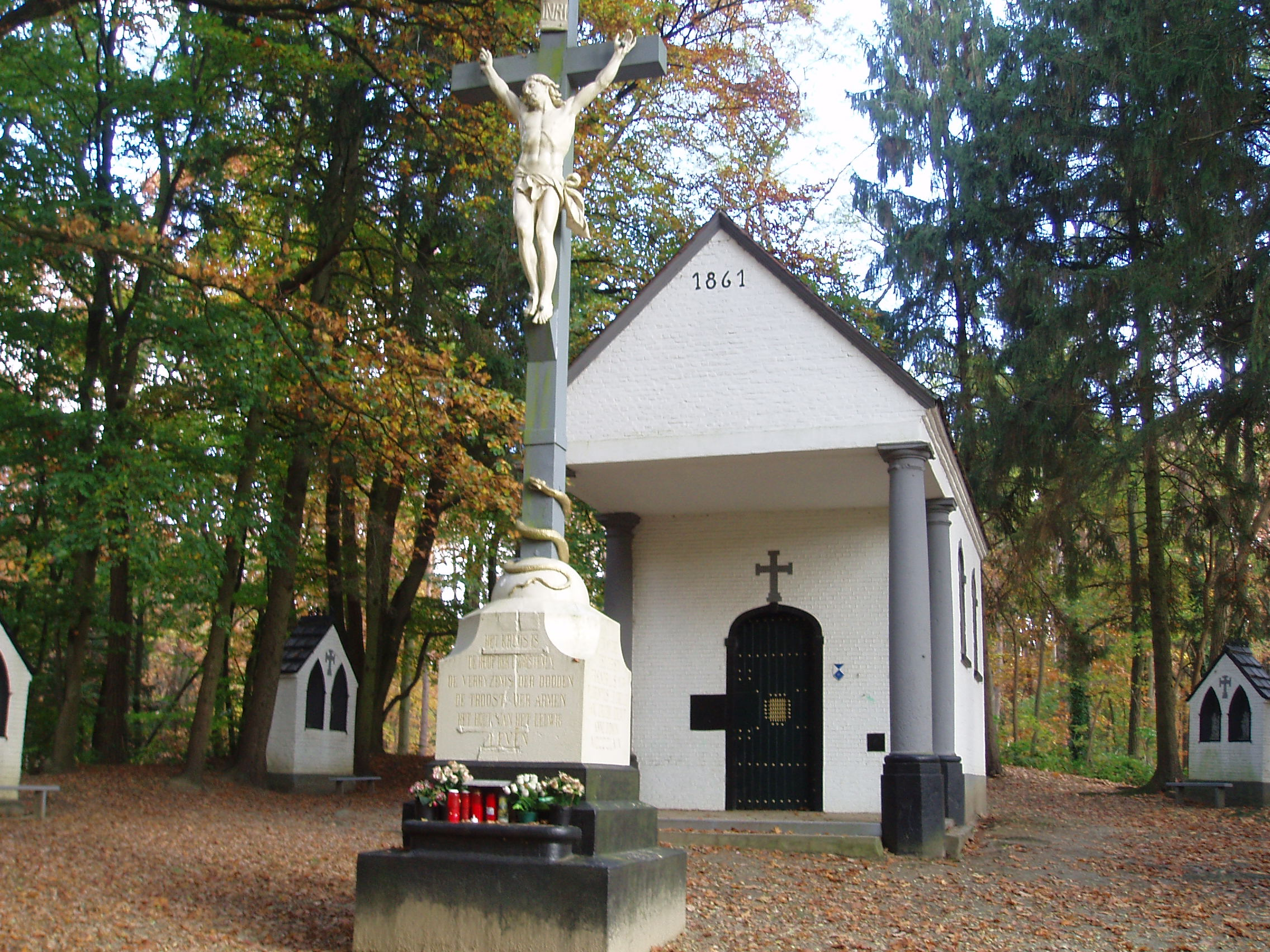 Kruiskensberg